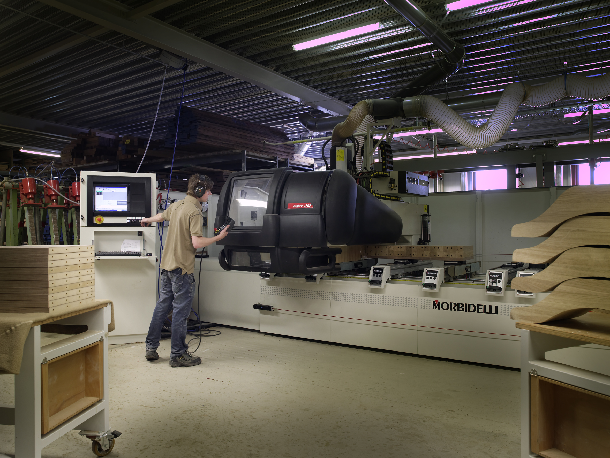 CNC machine in meubelmakerij Kees Verhouden